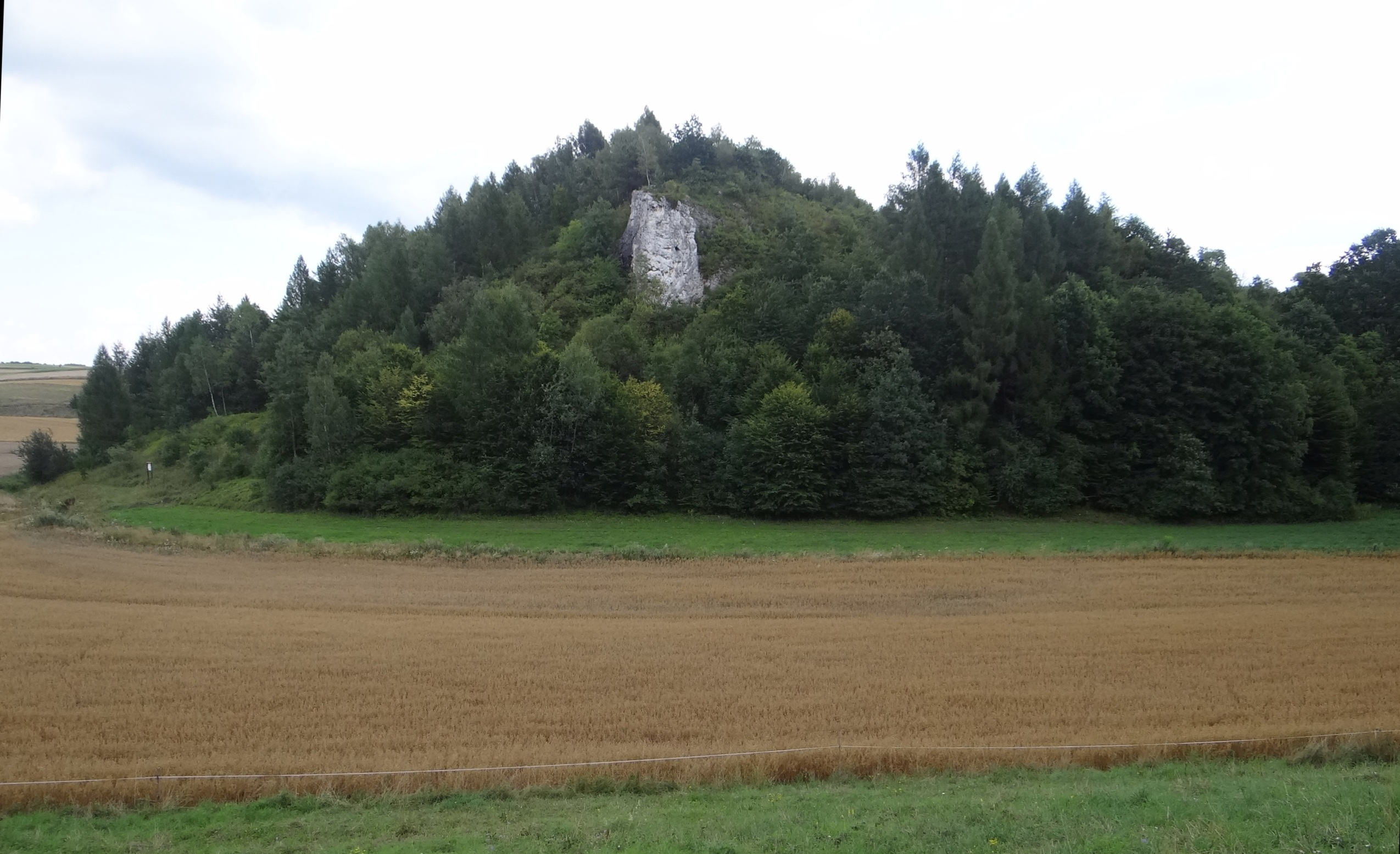 Skała Zachwytu w Wielmoży